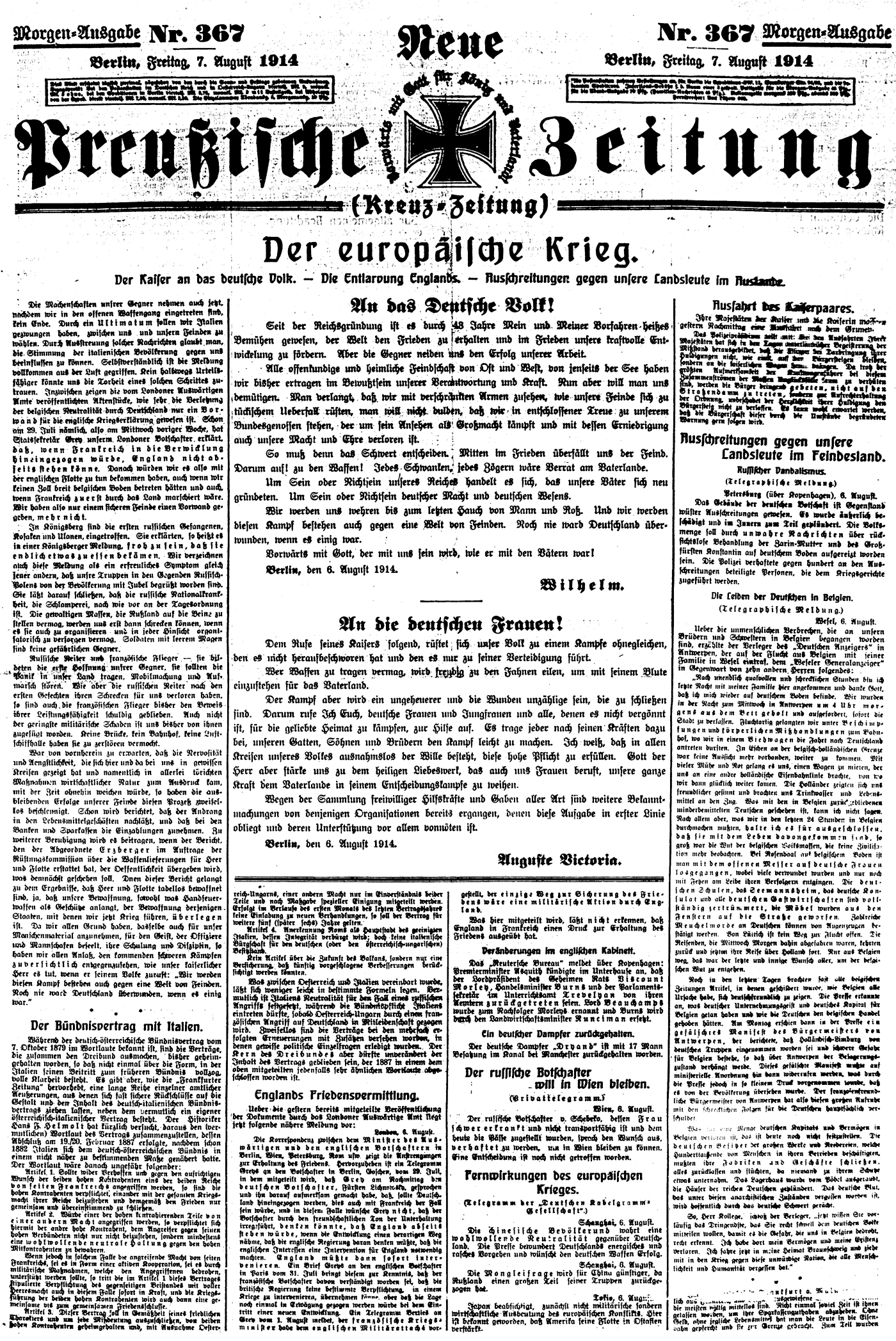 Neue Preußische Zeitung (Kreuz-Zeitung)